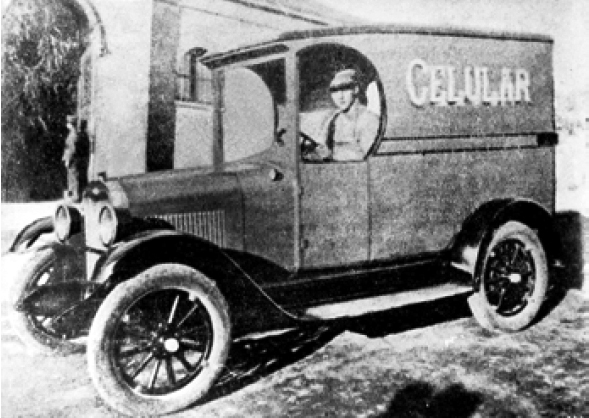 Gendarmería de Chile: Carro celular comprado por la comunidad de Antofagasta en la década de 1920.